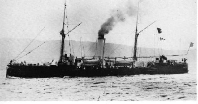 Croiseur protégé espagnol Marques de la Ensenada (1890)